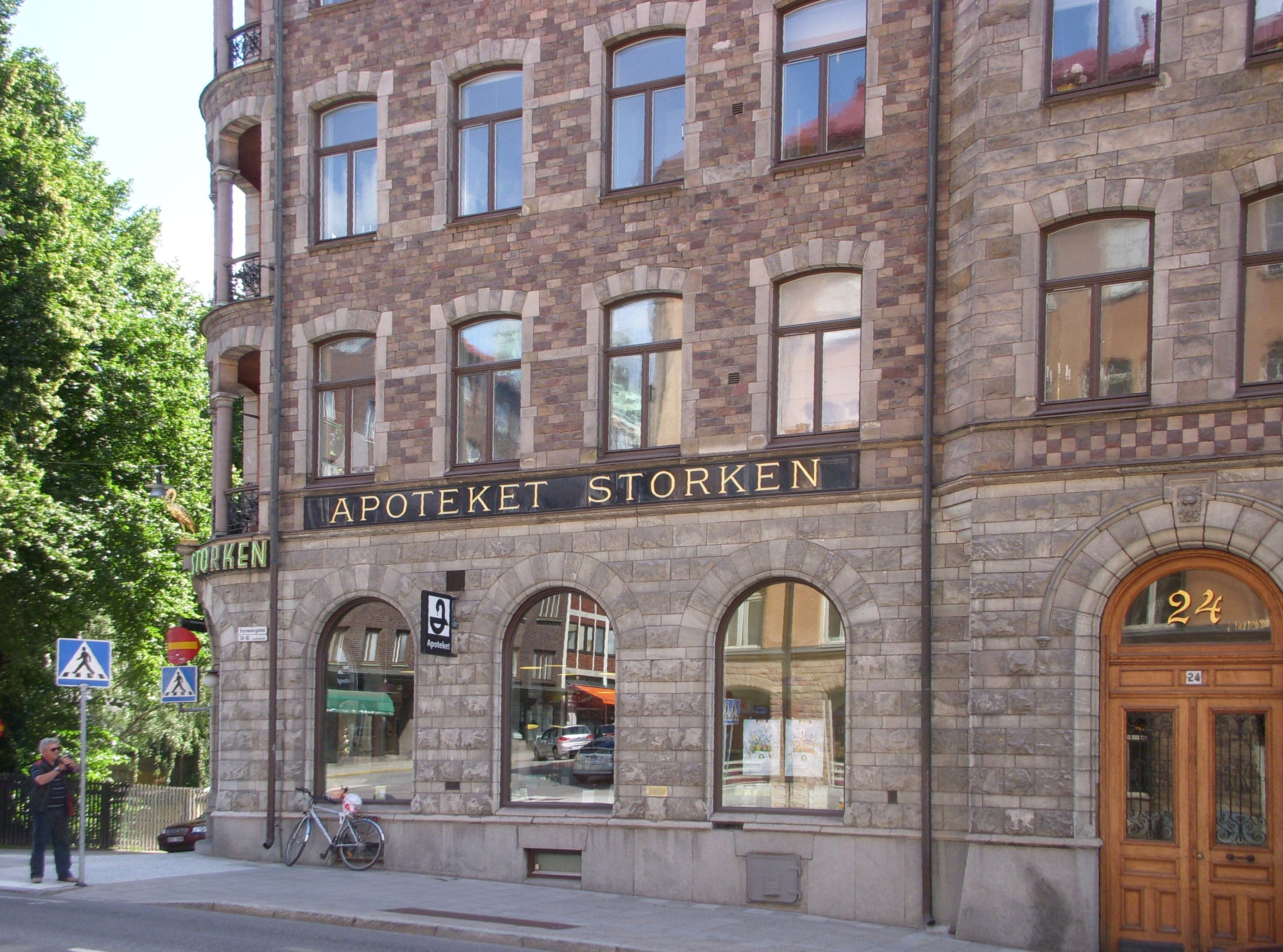 Apoteket Storken, byggnaden vid Styrmansgatan på Östermalm i Stockholm